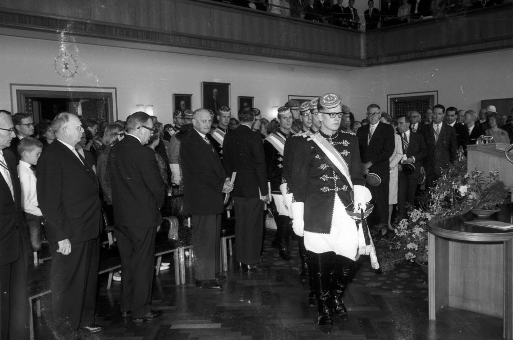 im Rathaus. Einzug der Chargierten in den Ratssaal. Im Bild u.a. Stadtpräsident a.D. Wilhelm Sievers.